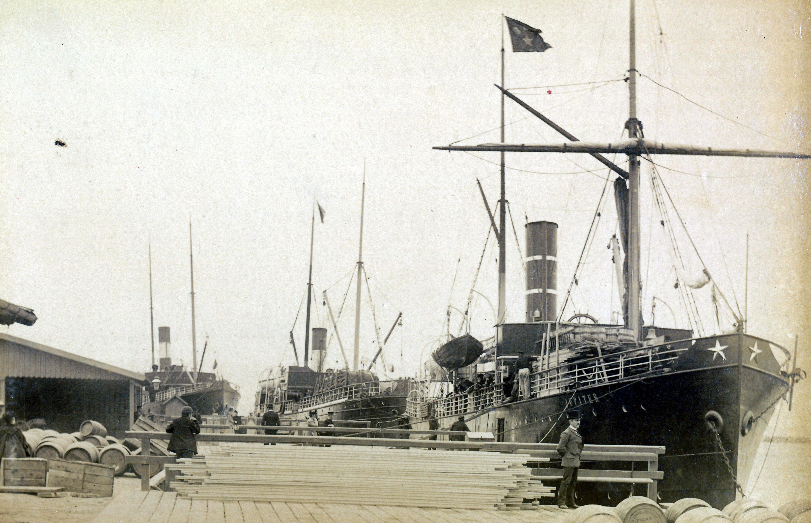 Format: Fotopositiv Dato / Date: 1893 Fotograf / Photographer: Jørgen Wickstrøm Sted / Place: Brattøra, Trondheim Lenke / Link: Se diskusjonen rundt de to fotografene Johan Erik Wickstrøm og Jørgen Johan Brock Wickstrøm (Preus Museum) Litteratur: Trondhjemske Samlinger: 1893 - et år i Trondhjem. Bilder av Jørgen Wickstrøm (Trondheim 2001) Eier / Owner Institution: Trondheim byarkiv, The Municipal Archives of Trondheim Arkivreferanse / Archive reference: Tor.H40.B24.F1643 [T0069] Fra havna. Til høyre ligger Jupiter (I) tilhørende Det Bergenske Dampskibsselskap .